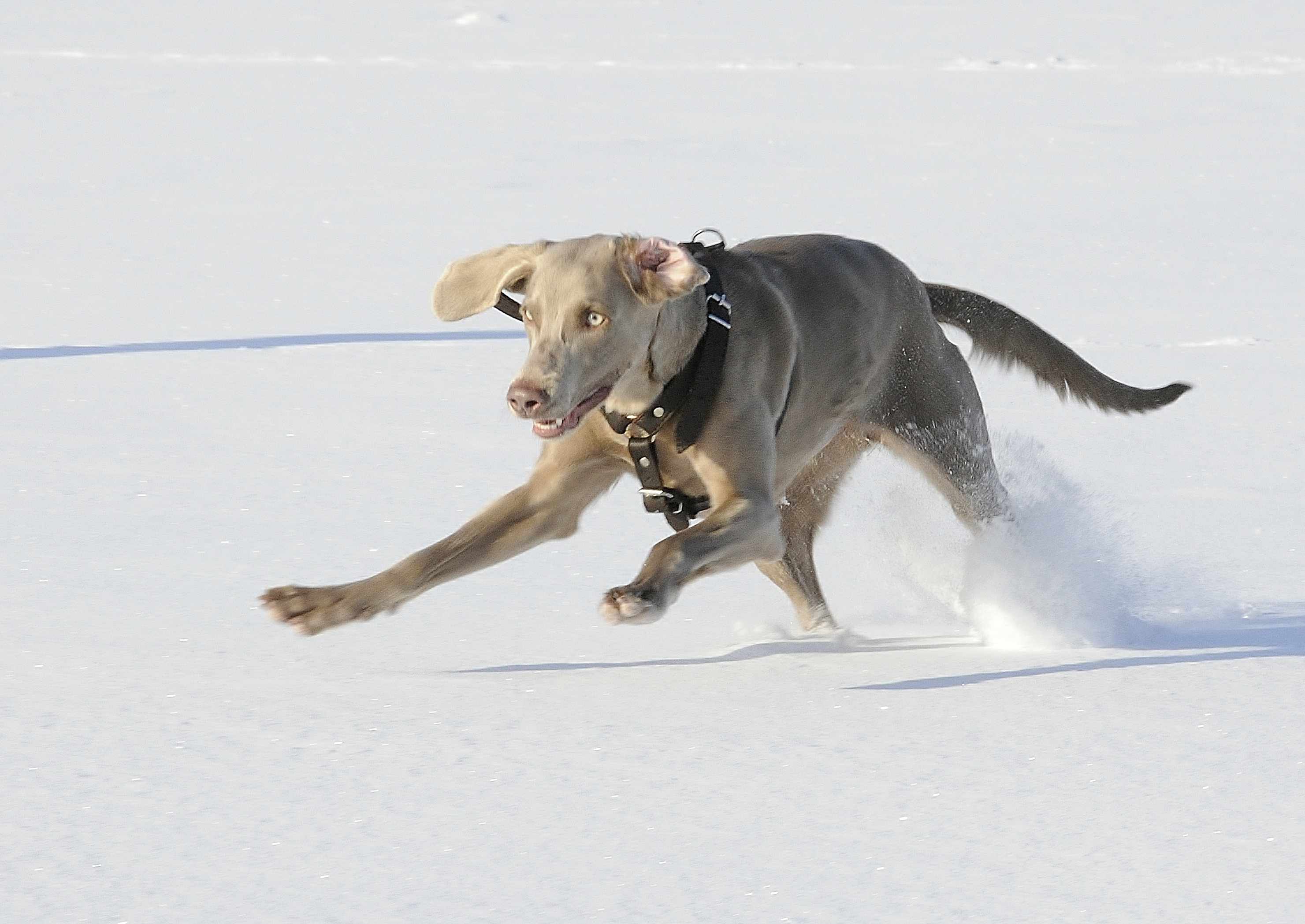 Weimaraner running in snow.